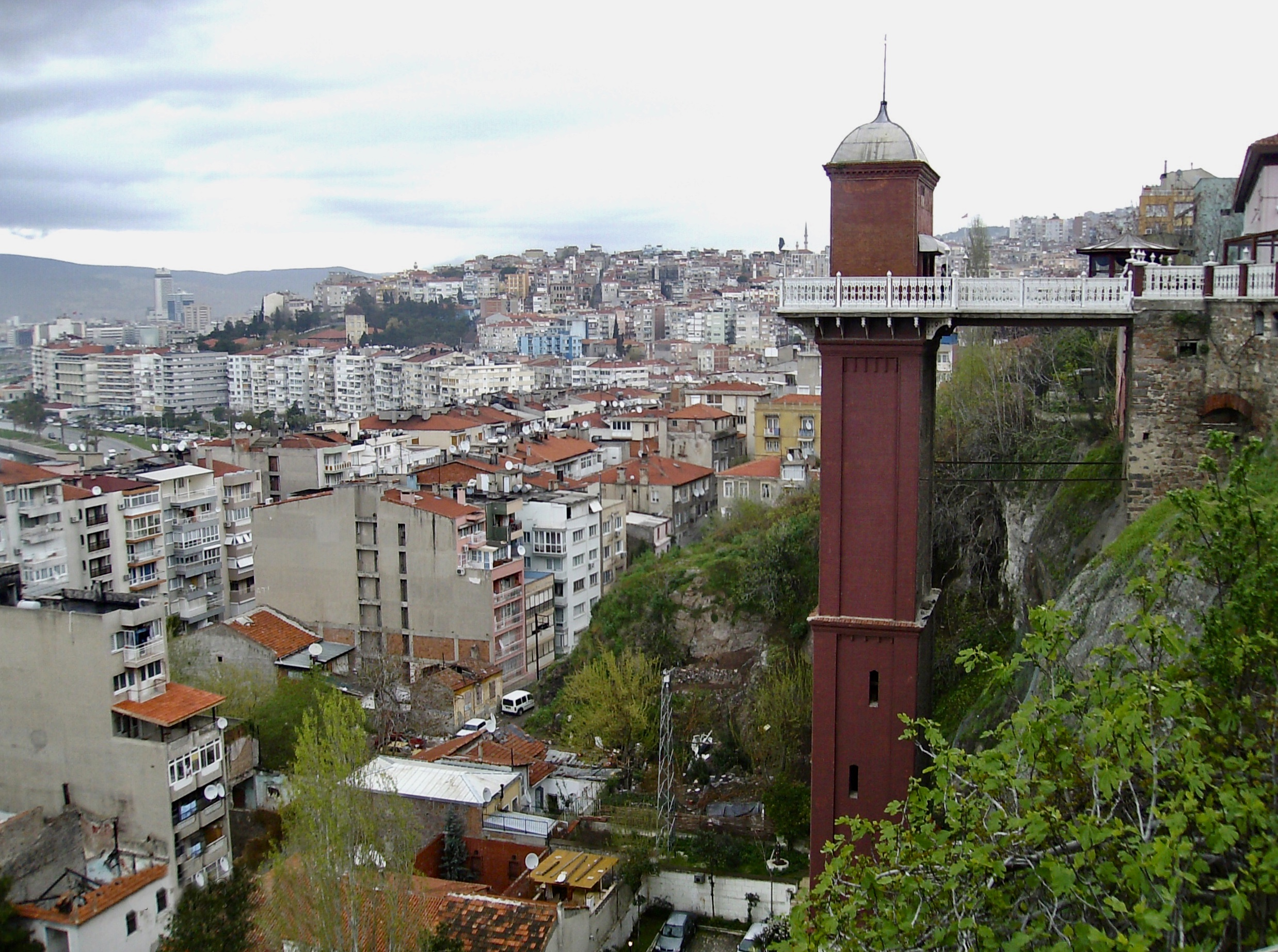 Kendi çekimim